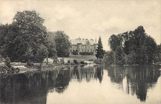 Ansicht von Schloss Kettenburg bei Visselhövede (Lüneburger Heide), Blick auf Schloss und Teich. Das Schloss wurde 1875 bis 1878 von der Familie von der Kettenburg erbaut. Das Schloss mit angebauter Kapelle diente als Ersatz für eine Burg aus dem 15. Jahrhundert (die auf einer noch älteren Burgstelle errichtet war), die im 18. Jh. bereits verfallen war. Das Schloss und die Kapelle wiederum waren um 1955 so verfallen und mit Schwamm befallen, dass sie 1960 abgerissen wurden. [1]